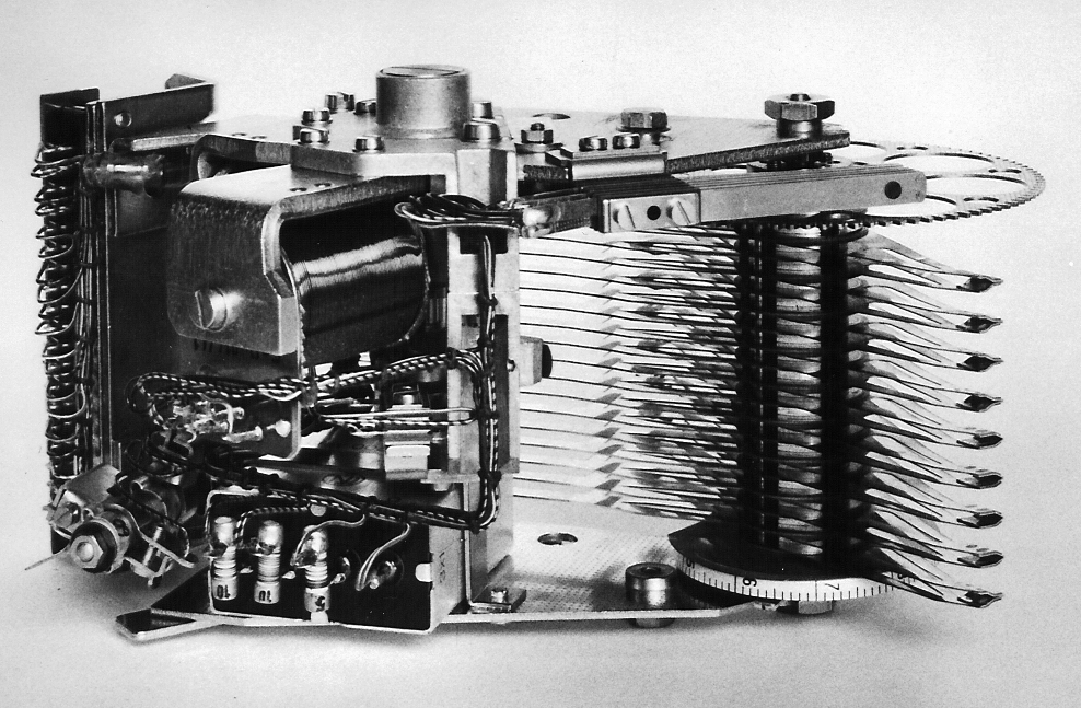 Motorwähler für System 48, Juni 1957